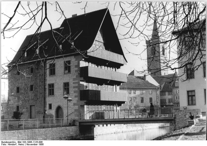 ADN-ZB-Hirndorf-25.11.1986-Erfurt: Denkmalpflege- Die Rekonstruktion des ältesten Erfurter Profangebäudes, des Hauses in der Horngasse 3-4, ist abgeschlossen. Die Mitarbeiter des Instituts für Denkmalpflege Erfurt werden das Haus, desen Geschichte bis in das 14. Jahrhundert zurückgehrt, als Restaurierungsatelier nutzen. An der Krämerbrücke (im Hintergrund) wurden in diesem Jahr die Brückenbögen restauriert und zum Teil erneuert. In Thüringen gibt es über 8 000 Objekte, die unter Denkmalschutz stehen (darunter der historische Erfurter Stadtkern) sowie etwa 30 000 geschützte Einzelwerke. Information added by Wikimedia users.Im Hintergrund der Turm der Ägidienkirche.